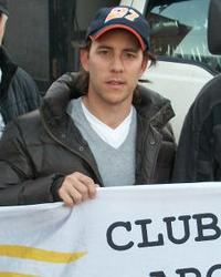 Nicolás Filiberti, piloto argentino de automovilismo internacional